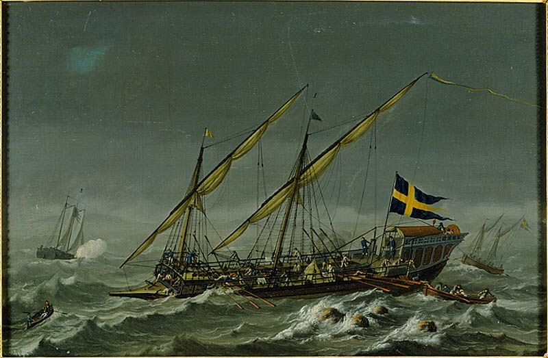 Galären Calmar 1788 Påskrift: 1788 den 4:de November. Enligit Ordres Lättade Galleren Calmar, och skulle då gå ifrån Tvärmunde Redd till Åbo. Målning av Johan Tietrich Schoultz